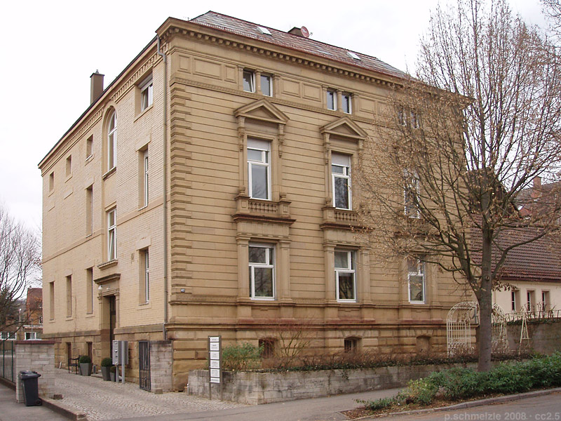 Denkmalgeschütztes Gebäude in der Bismarckstr. 67 in Heilbronn